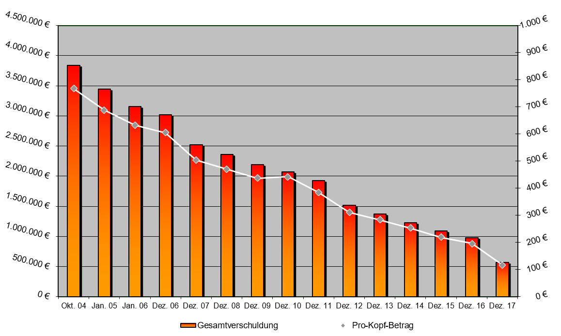 Verschuldung Niedernbergs über die letzten Jahre